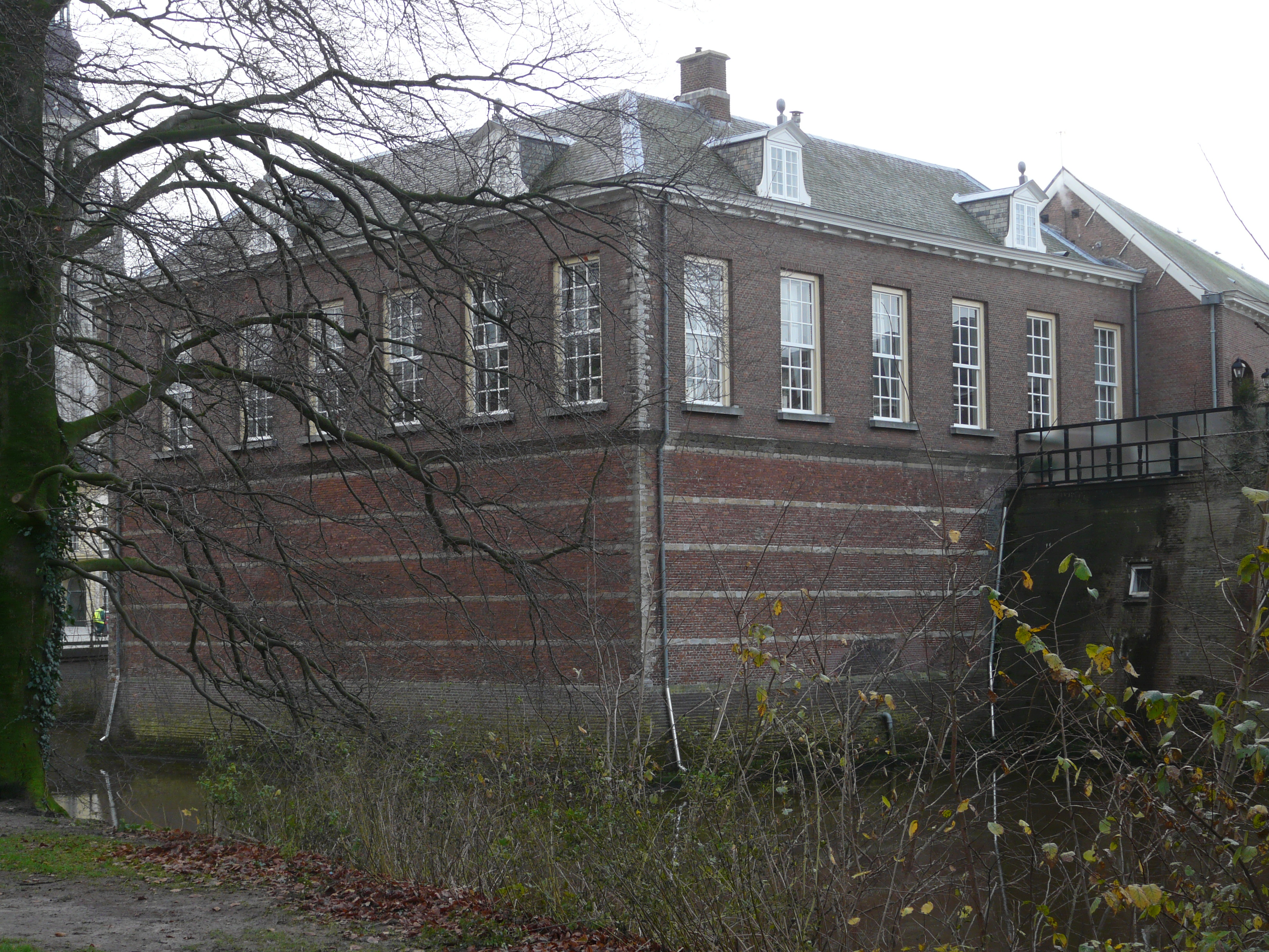 Zicht op een deel van het Blokhuis van het Kasteel van Breda gevestigd aan het Kasteelplein 10 in Breda Centrum in Breda